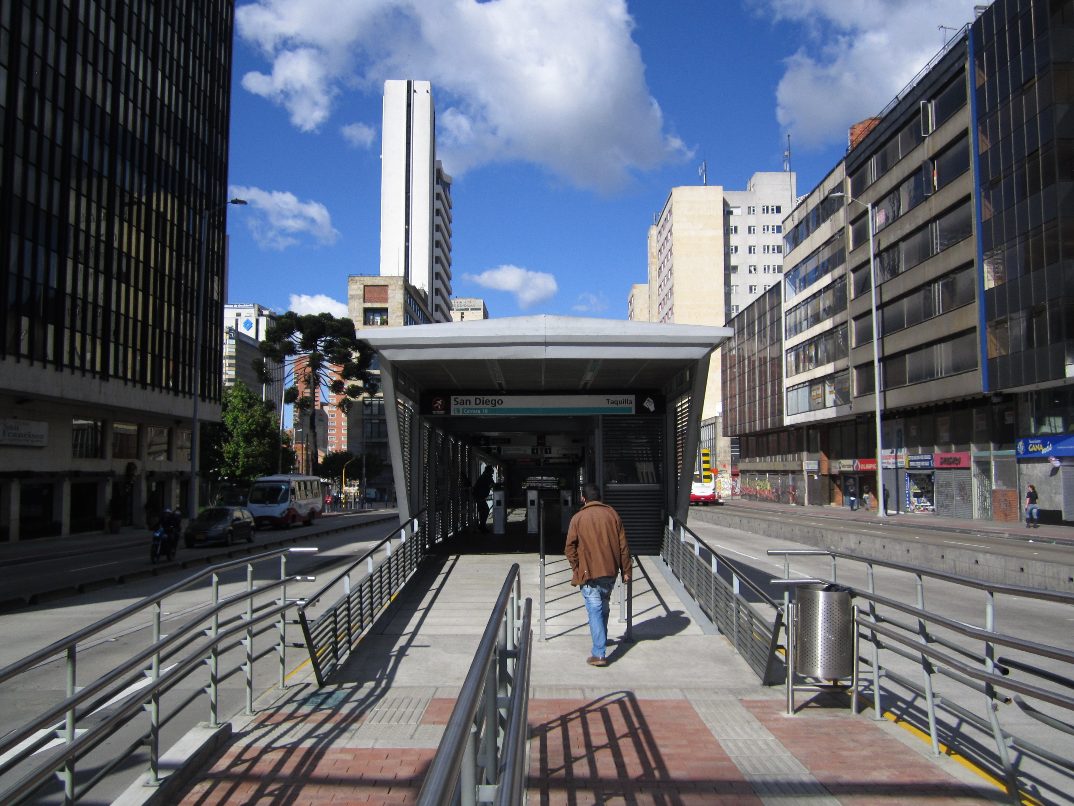 Estación San Diego del sistema TransMilenio, localidad de Santa Fe.